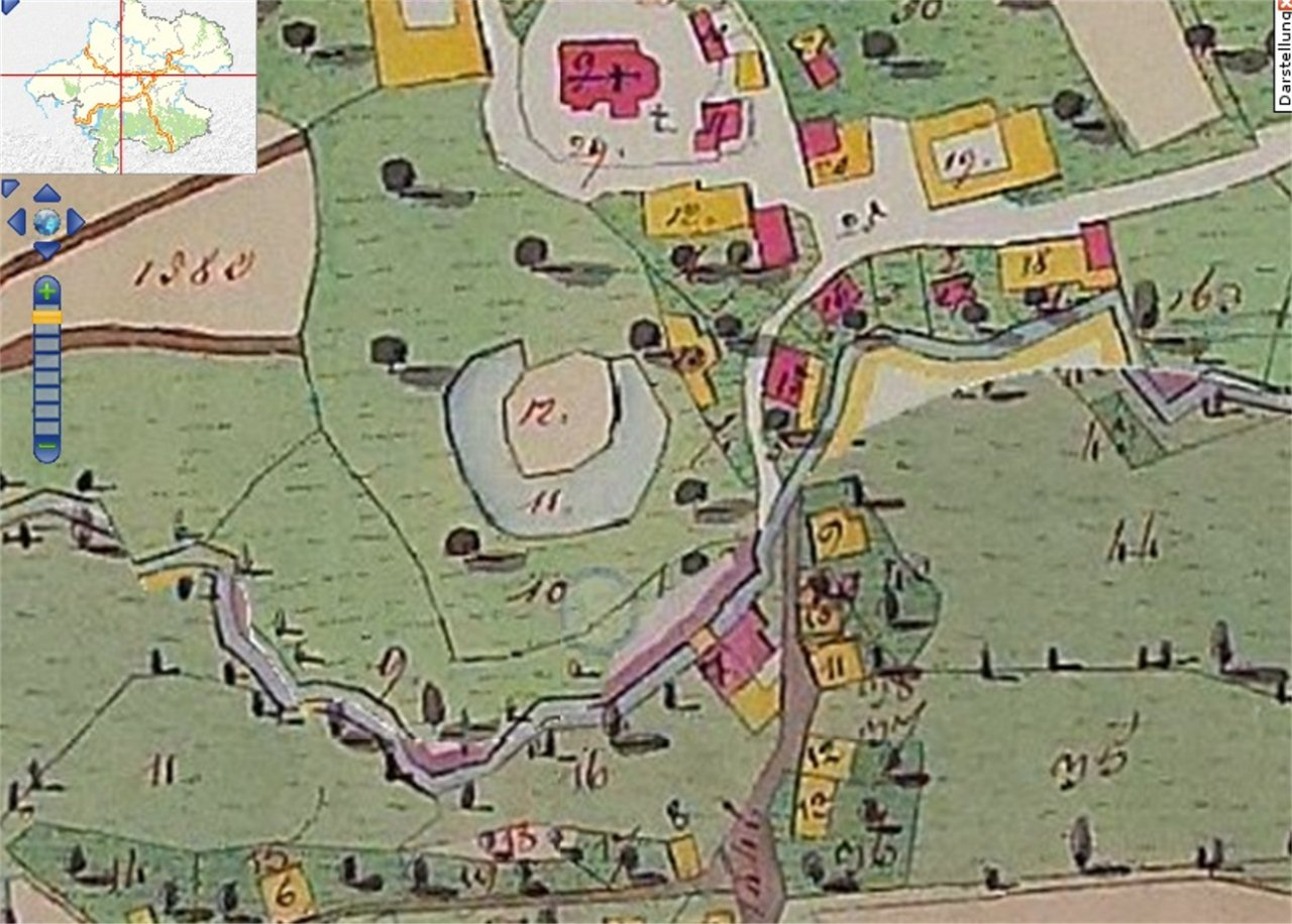 Mittelalterlicher Sitz "Mekchenhoven"